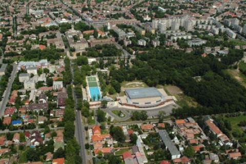 Hódmezővásárhely, Hungary, aerialphotography